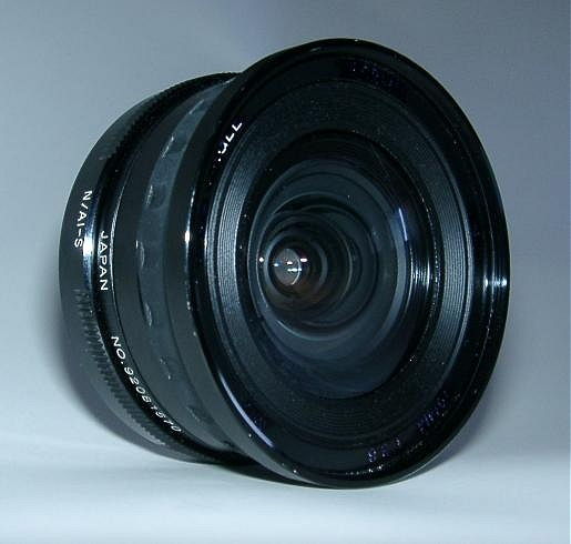 Foto: Användare:Chrizz